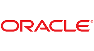 Монгол: Зураг: Оракл